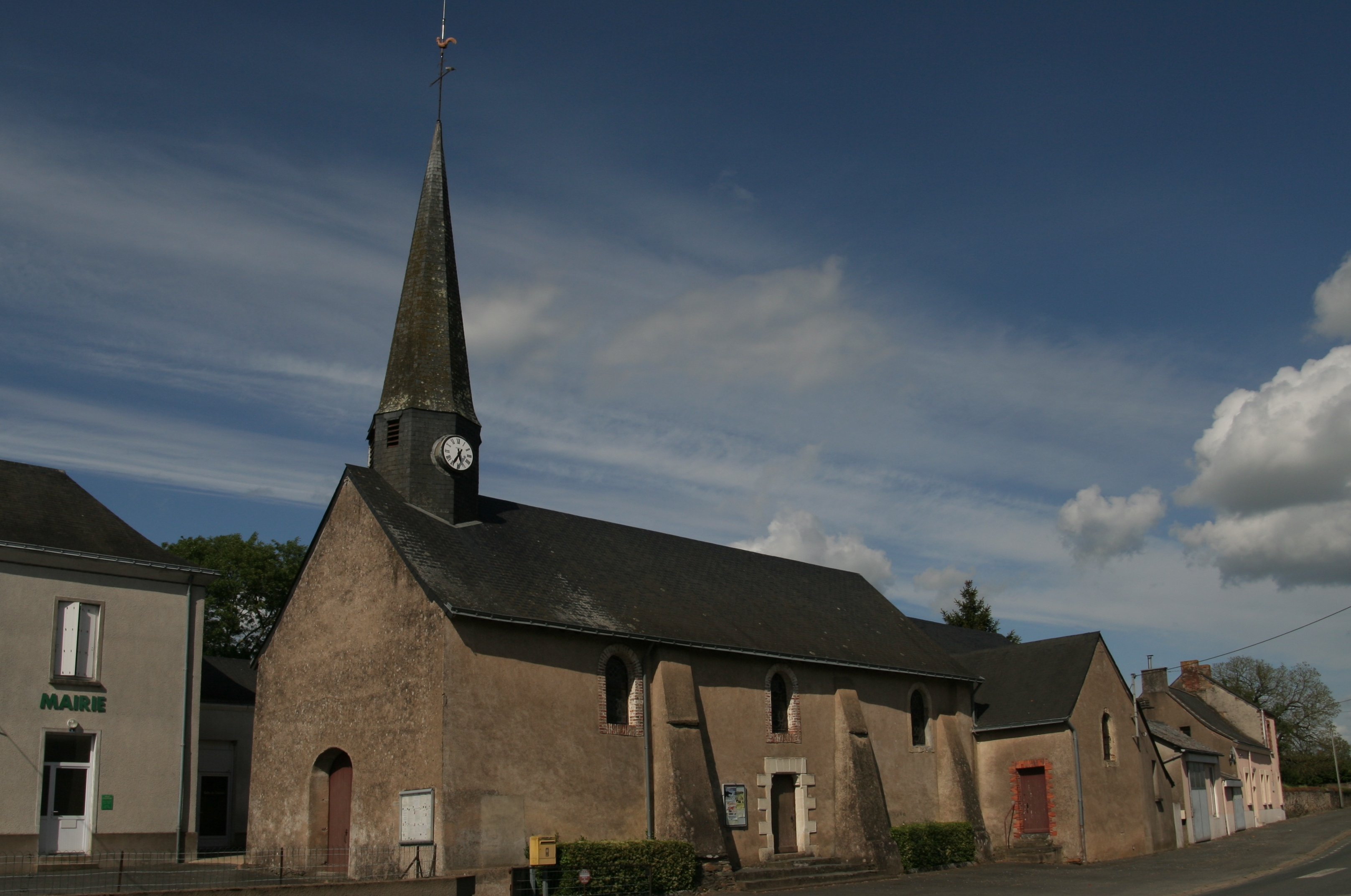 Église Saint-Martin-de-Tours de Vergonnes.